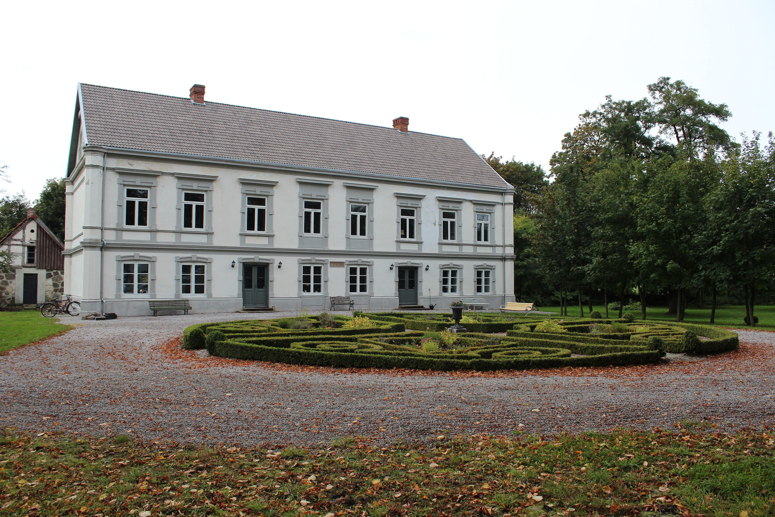 Westerstads Herrgård, fasad mot öster